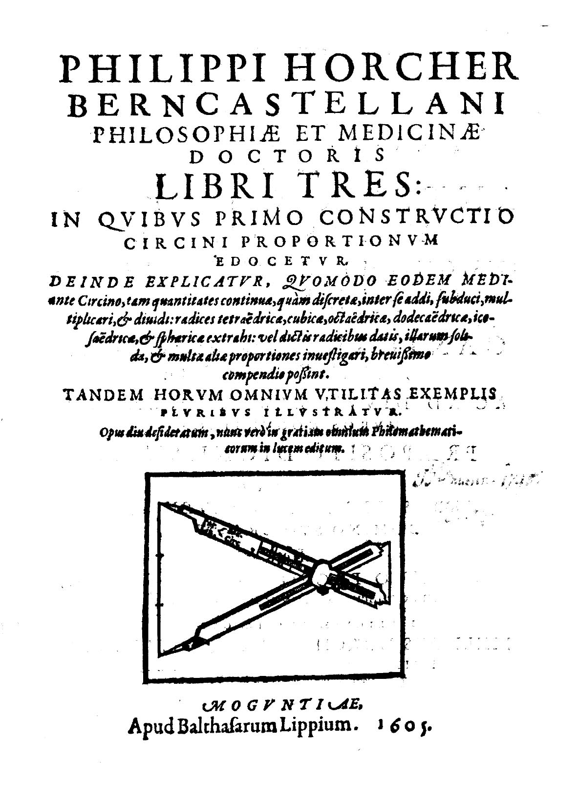 Philippi Horcher Berncastellani ... Libri tres: in quibus primo constructio circini proportionum edocetur. deinde explicatur, quomodo eodem mediante circino, tam quantitates continuae, quam discretae, inter se addi, subduci, multiplicari, & dividi : radices tetraedrica, cubicae, octaedricae, dodecaedricae, icosaedricae, & sphaericae extrahi : vel dictis radicibus datis, illarum solida, & multae aliae proportiones investigari, brevissimo compendio possint. tandem horum omnium utilitas exemplis pluribus illustratur .... - Moguntiae : Apud Balthasarum Lippium, 1605. - 53, [1] p., [1] c. di tav. : ill. ; 4º. - VD17-23:240372B .